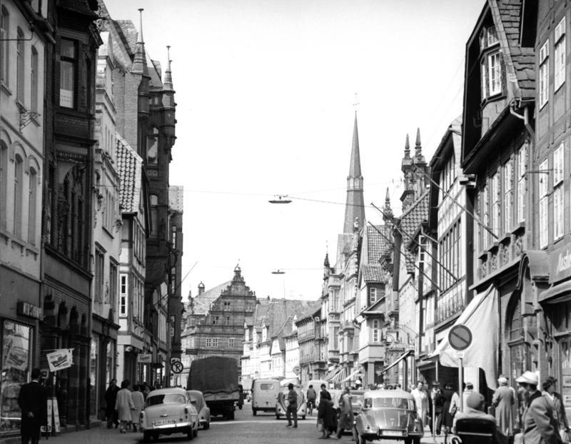 30.4.-1.5.1960 Hameln/Weser Osterstraße